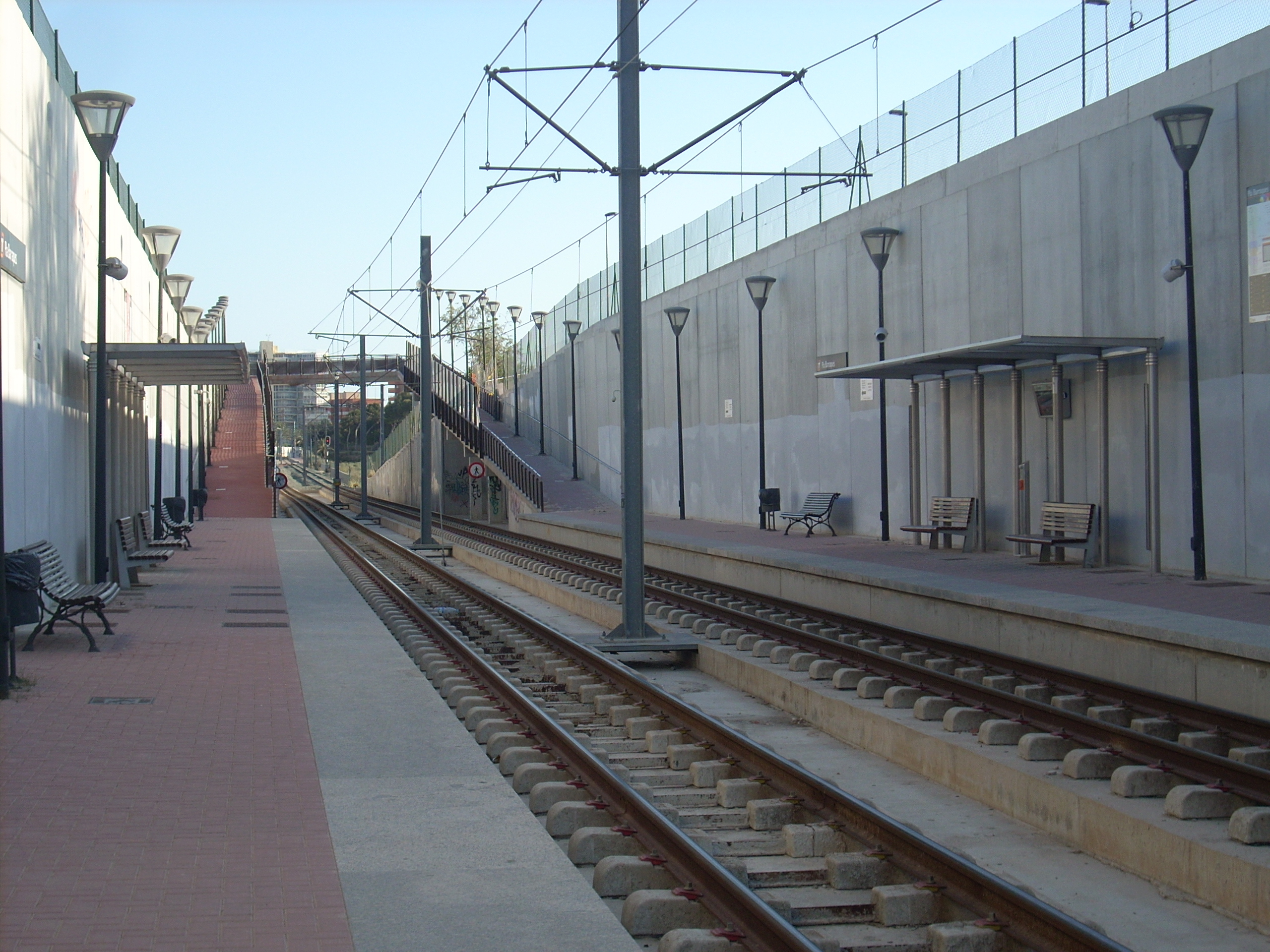 Apeadero Pla Barraques de la linea 3 desde las rampas de acceso para minusválidos.